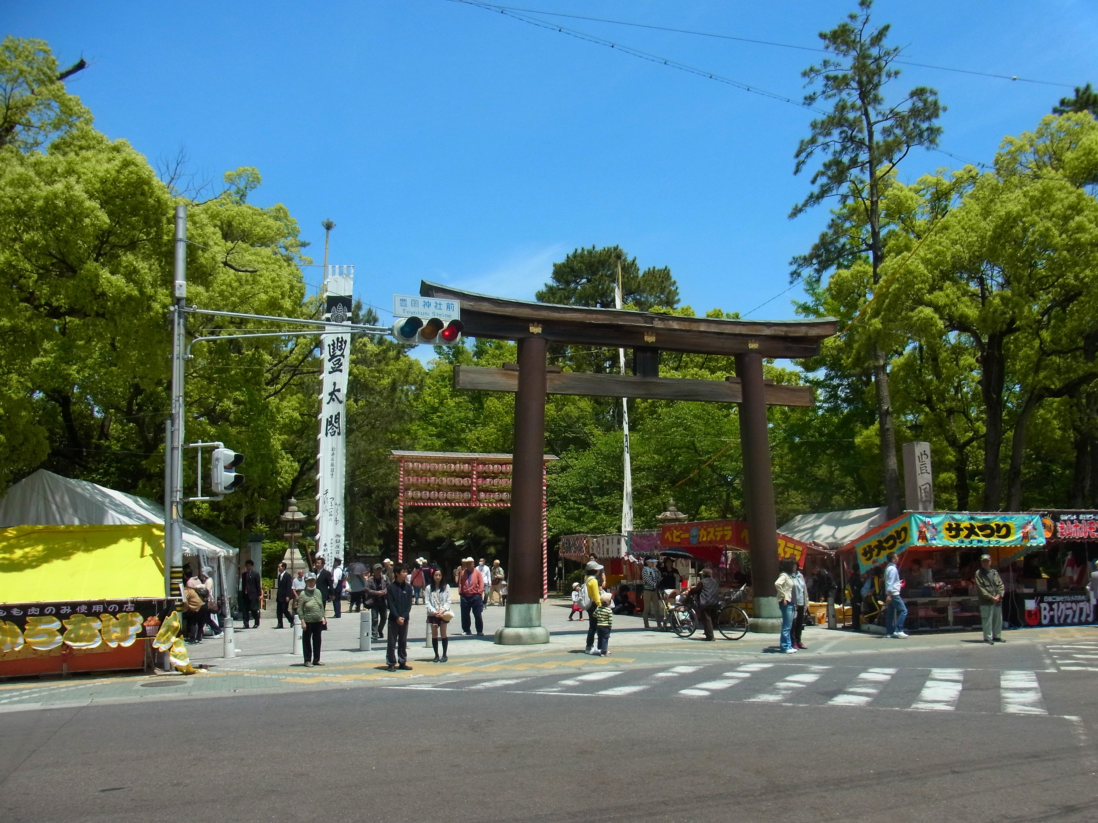 中村公園の豊国神社前